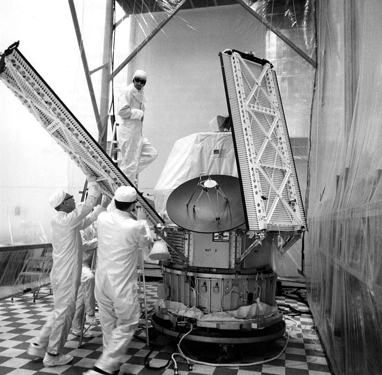 Mariner 8 - NASA